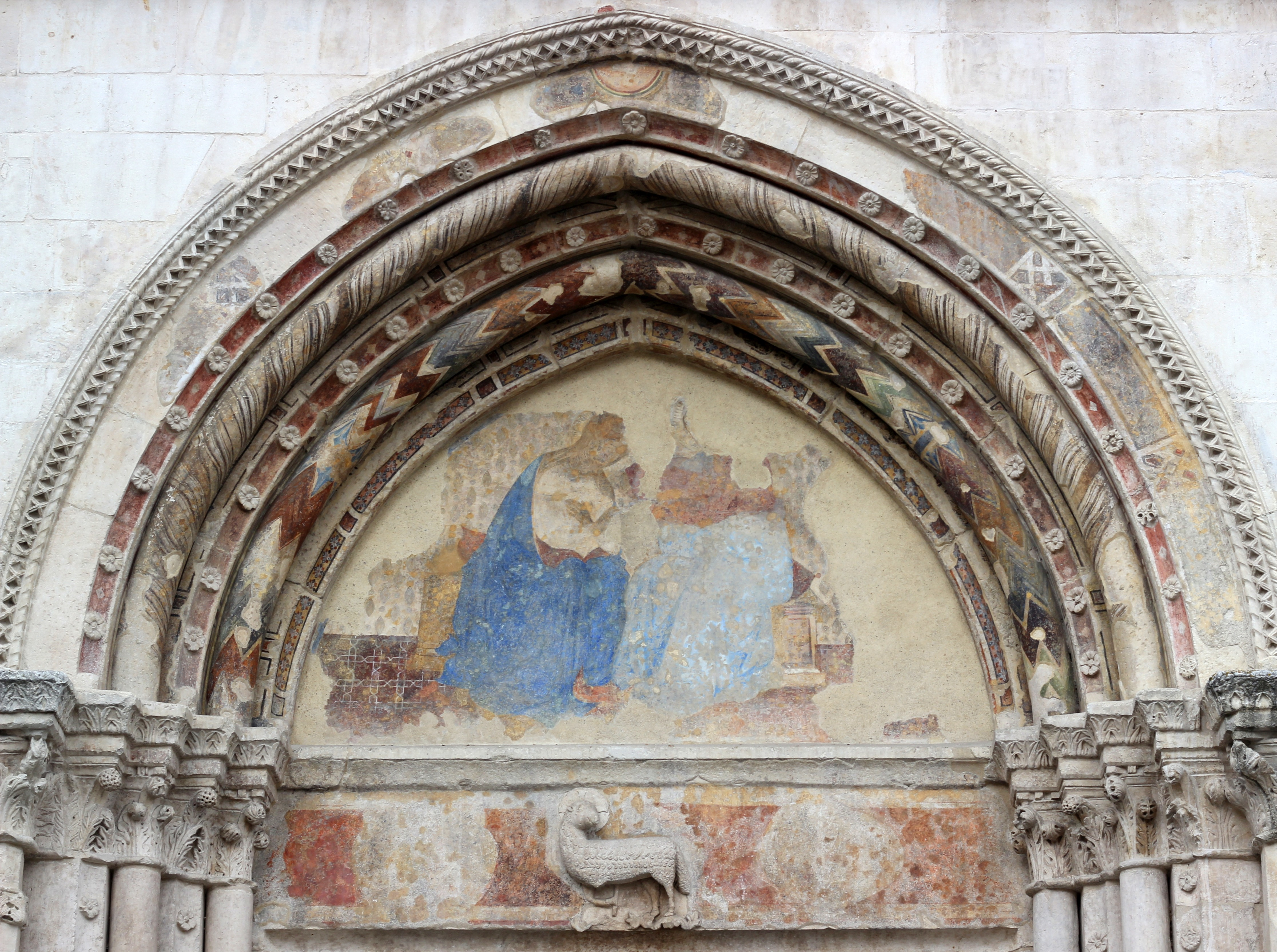 Tympanon am Portal von Santa Maria della tomba in Sulmona